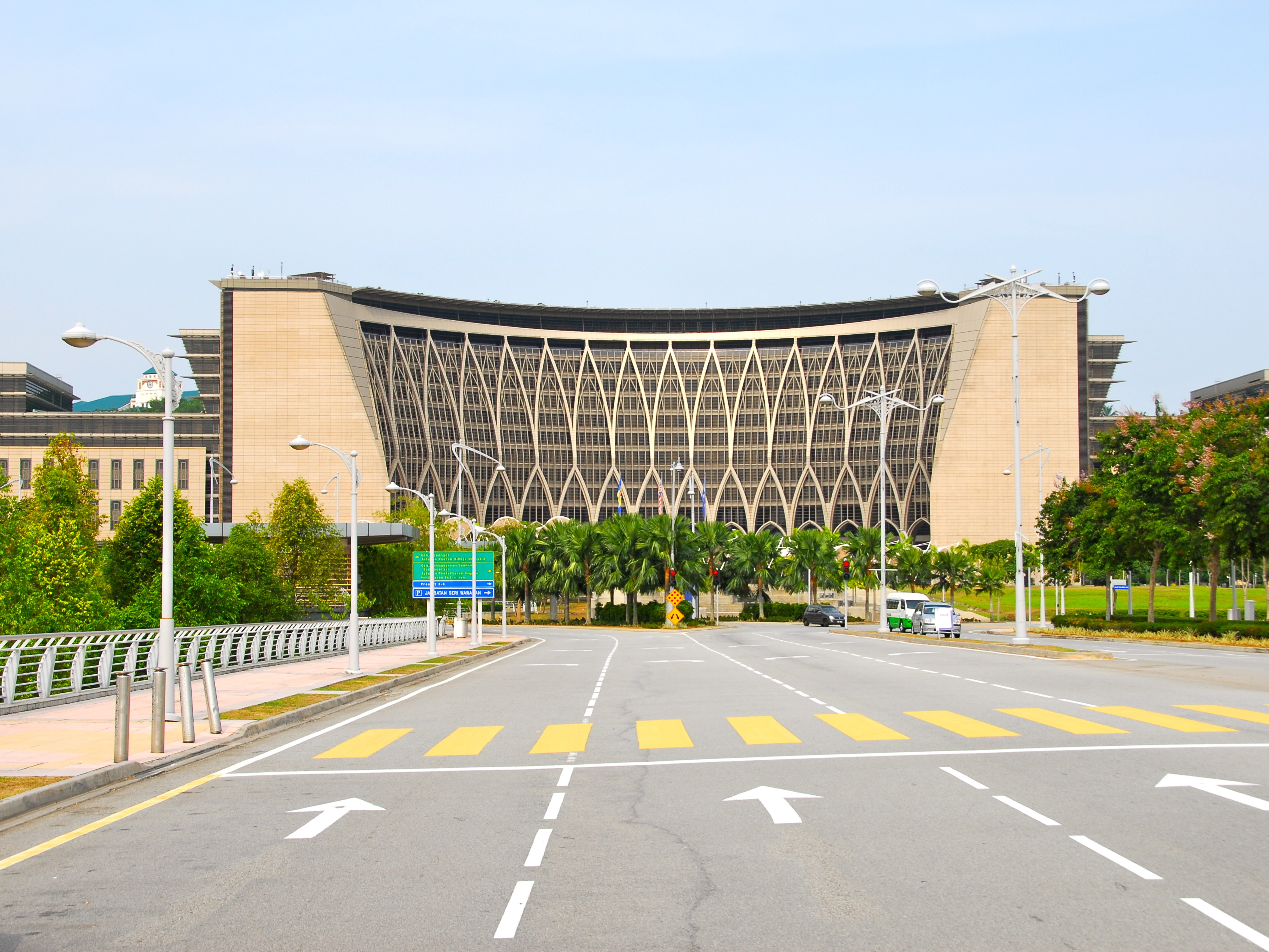 Putrajaya